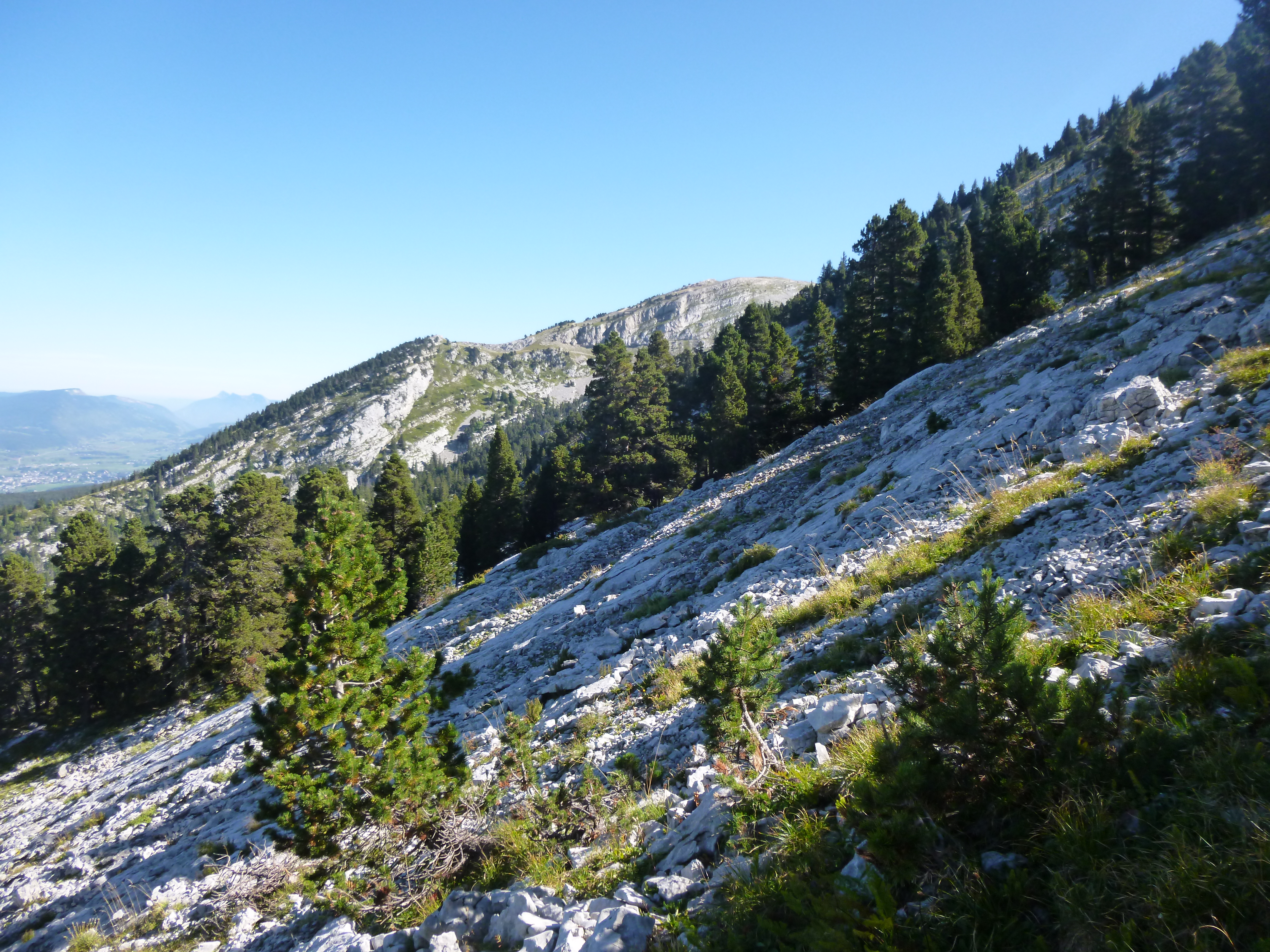 Au dessus du scialet de la Combe de Fer et au dessous de la tête des Chaudières se situent des lapiaz ou s'ouvrent des scialets.